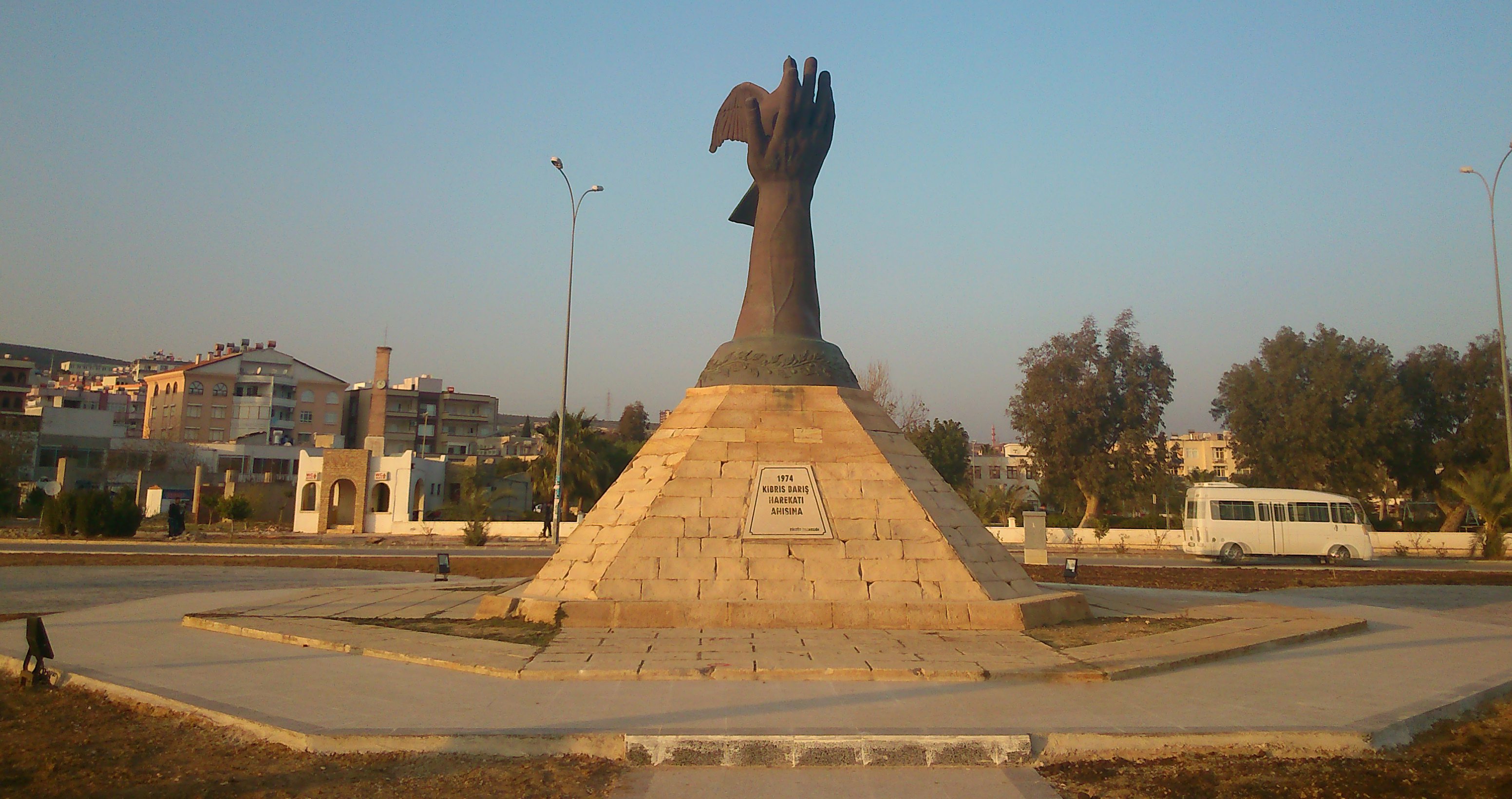 Mersin'in Silifke ilçesine bağlı Taşucu beldesinde bulunan 1974 Kıbrıs Barış Harekatı Anıtı.